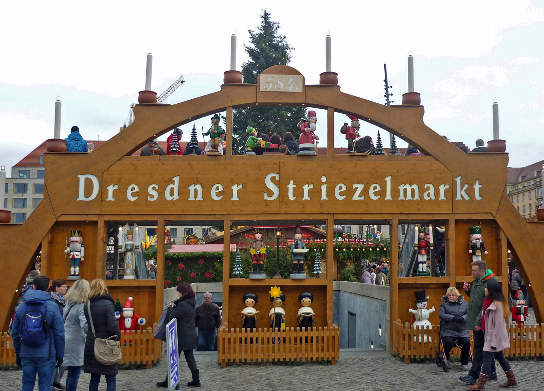 584. Striezelmarkt auf dem Altmarkt in Dresden 2018